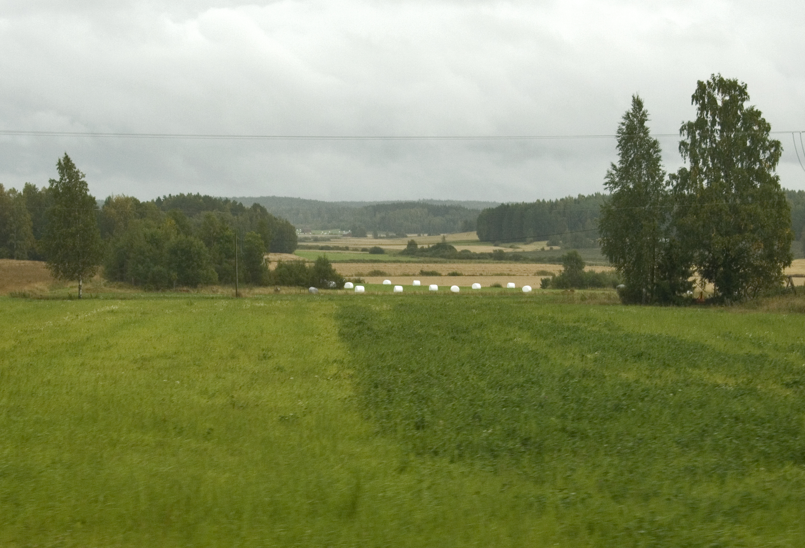 Vankimusjärvi on kuivatettu järvi Sastamala Pirkanmaalla 1